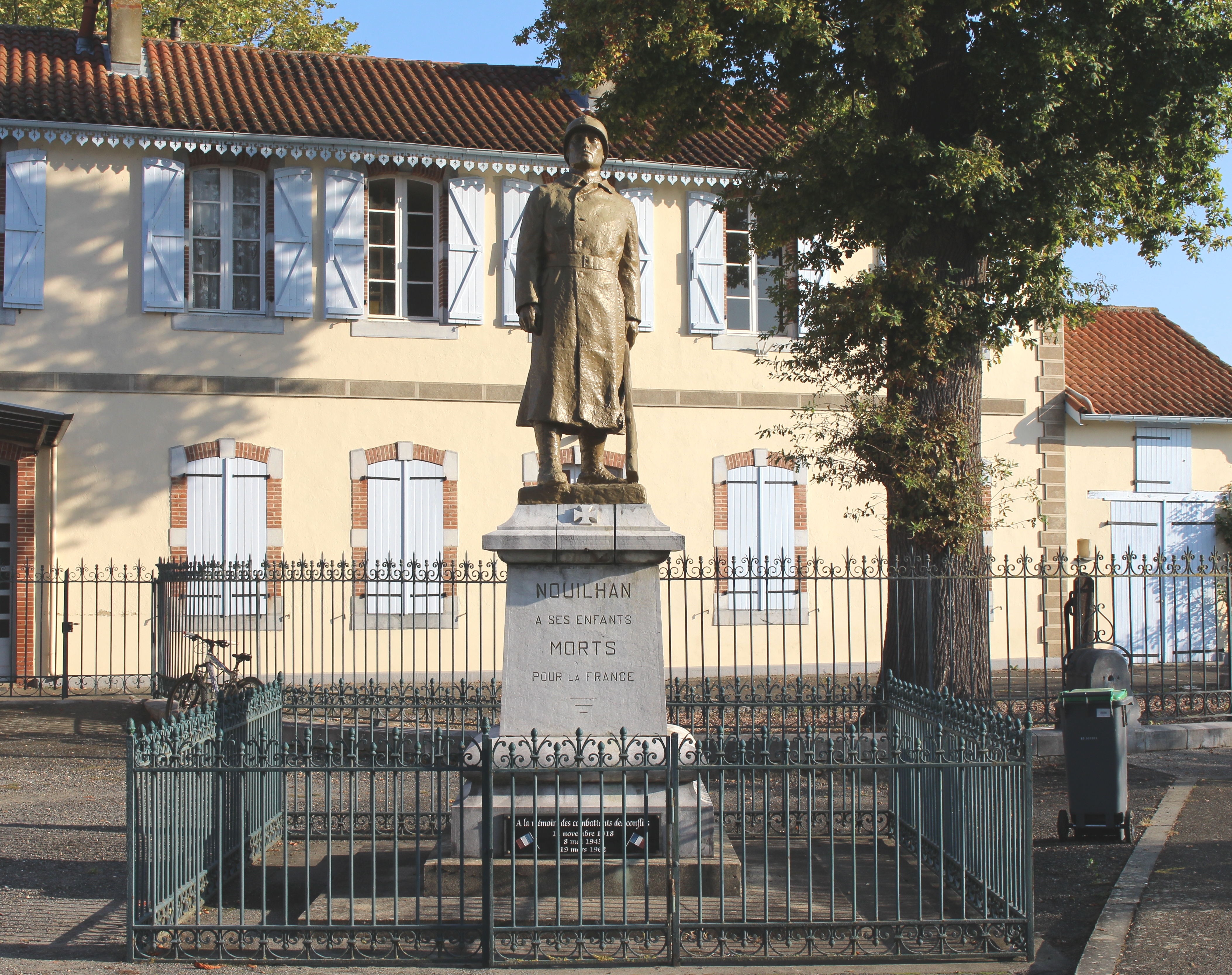 Monument aux morts de Nouilhan (Hautes-Pyrénées)